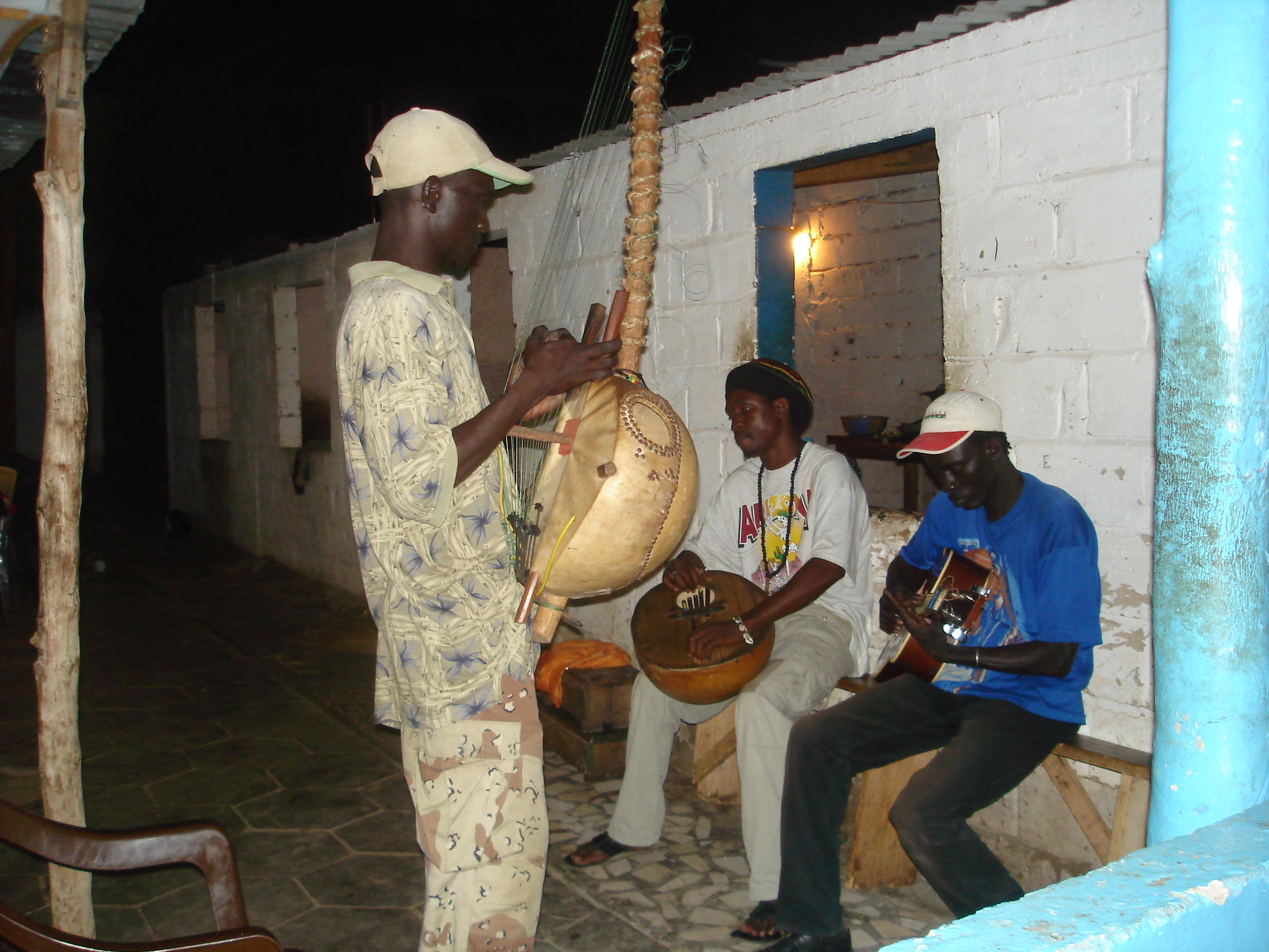 Groupe de musiciens sénégalais aux environs de la ville de Mbour (kora + gongoba) Auteur : Jean-Claude Perez